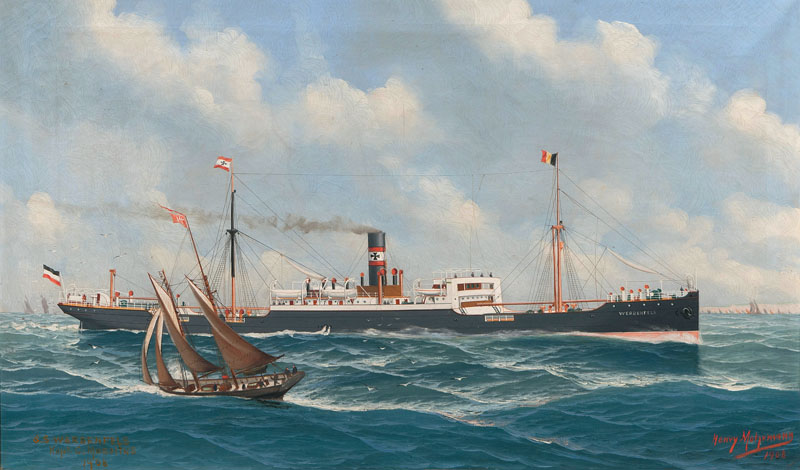 Die Werdenfels mit einem Antwerpener Lotsenboot; Öl auf Leinwand, 60,5 x 100 cm, r. u. sign. a. dat. Henry Mohrmann 1908. - Die Werdenfels war ein Frachtschiff der "Liebenfels-Klasse" der Deutschen Dampfschiffahrts-Gesellschaft Hansa aus Bremen